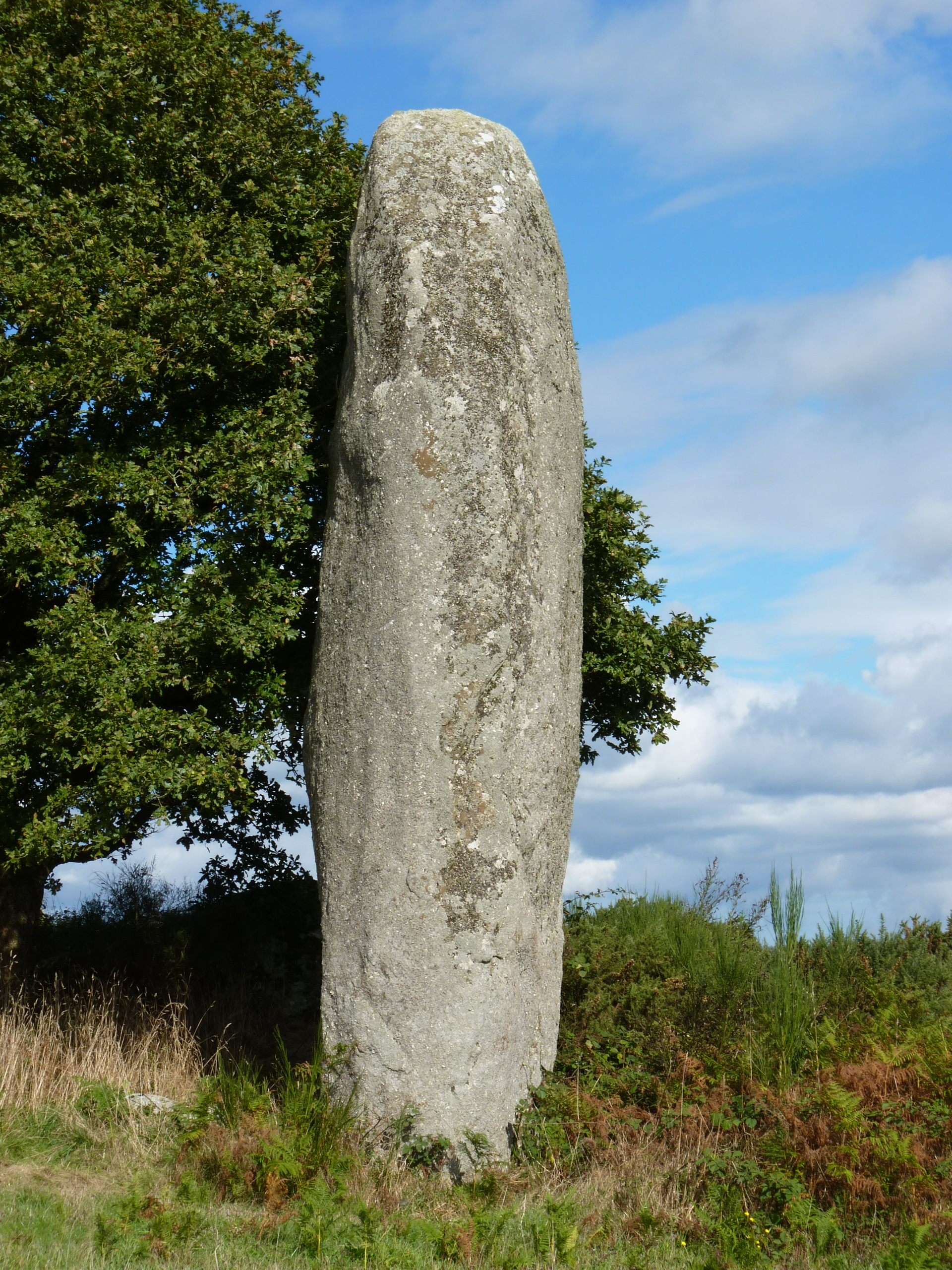 Grand menhir de plus de 7m de haut.